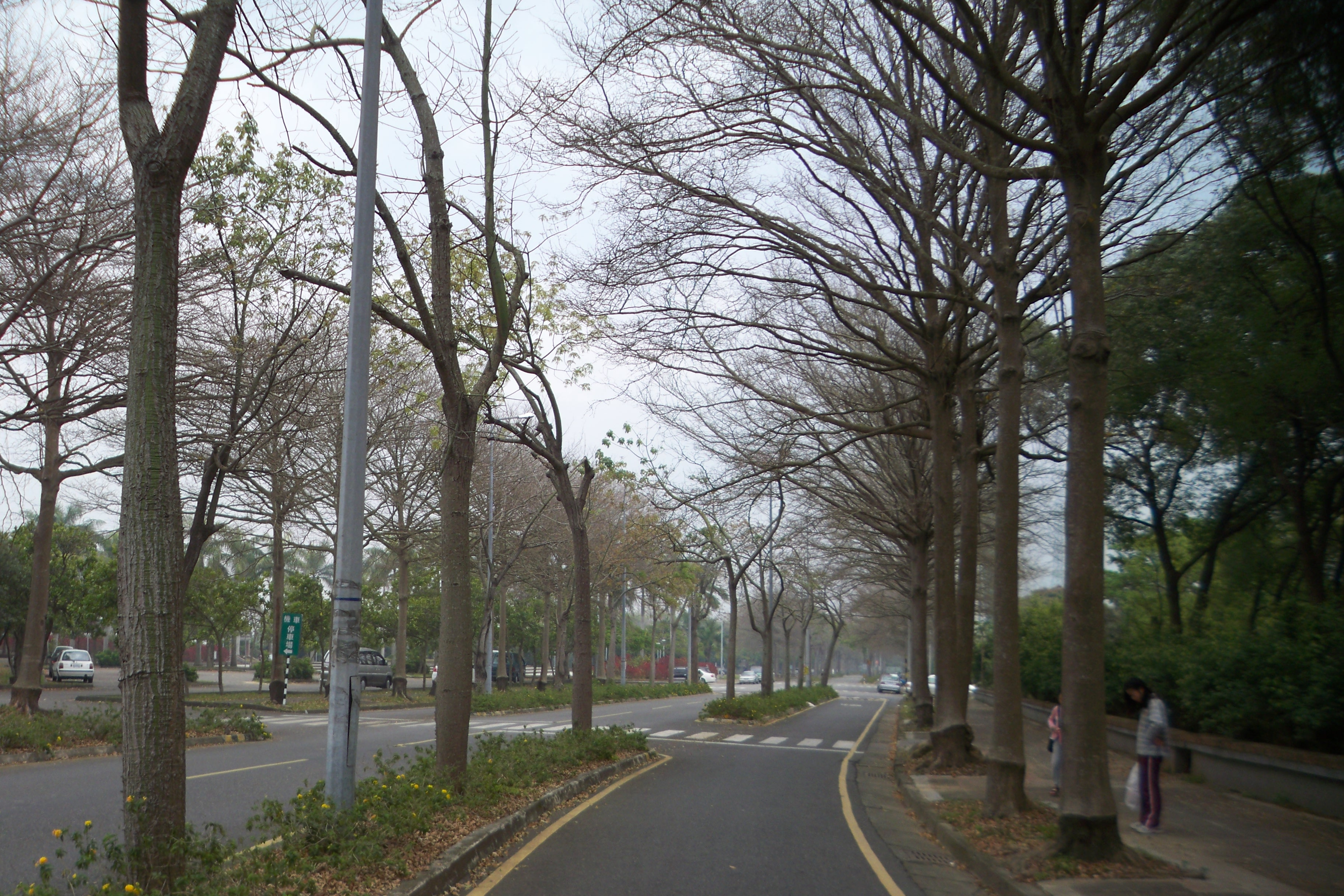 嘉義縣民雄鄉中正大學